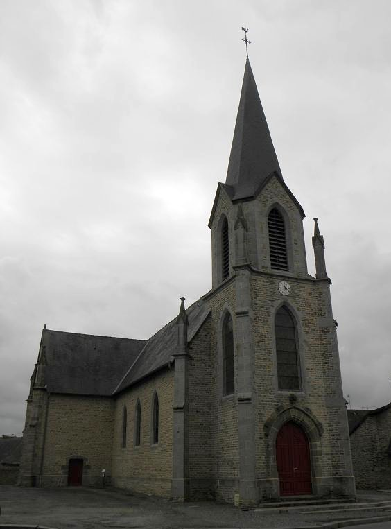 Église Saint-Pierre et de l'Immaculée-Conception de Mecé (35).